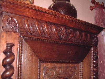 Je suis l'auteur de la photo et de réalisateur du meuble.